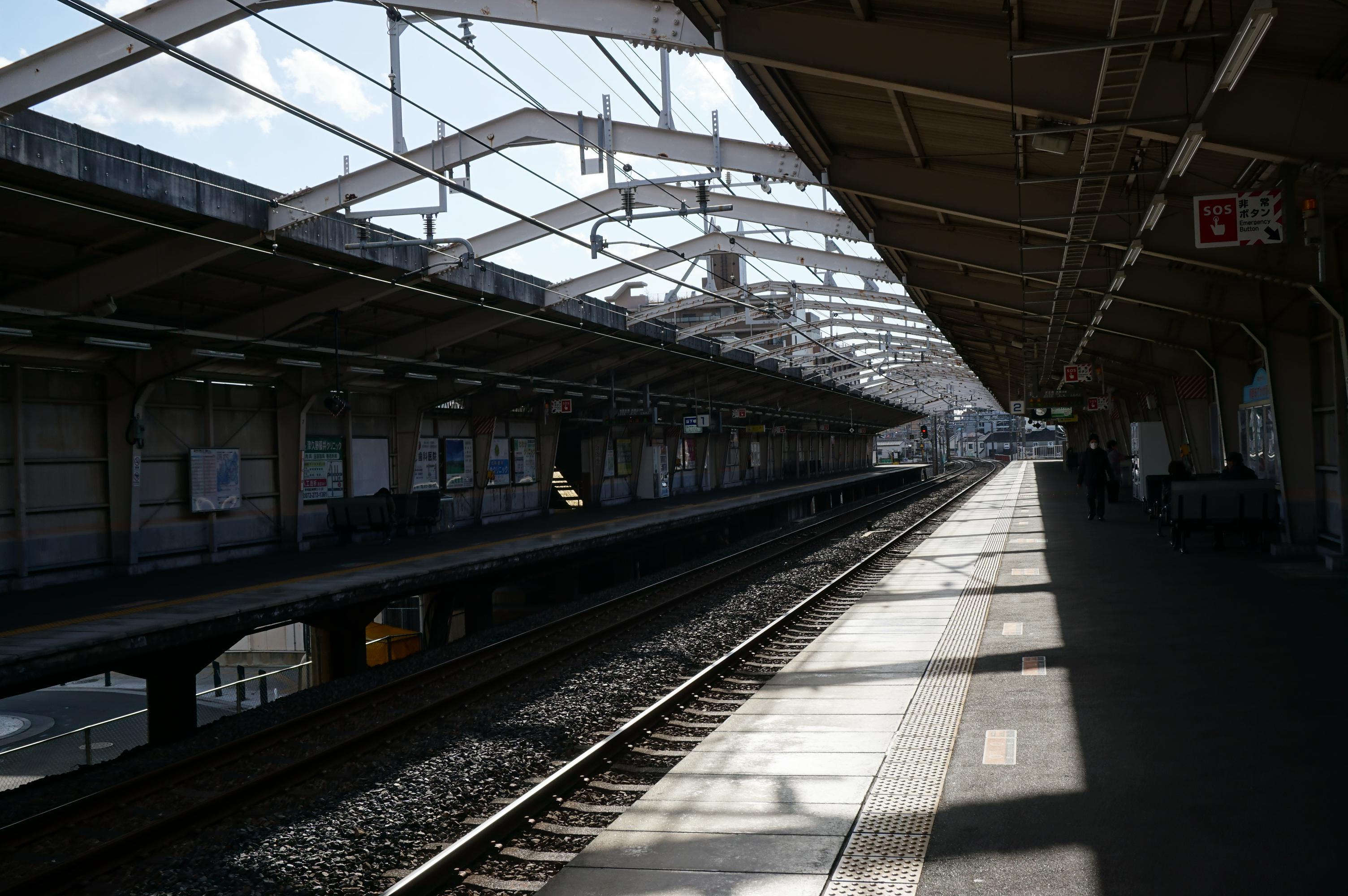 相対式のホーム Sony ILCE-6000